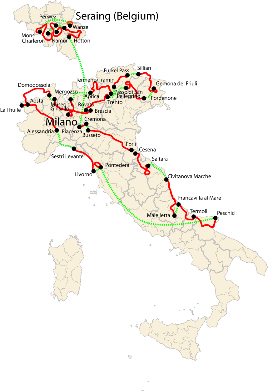 Giro d'Italia 2007